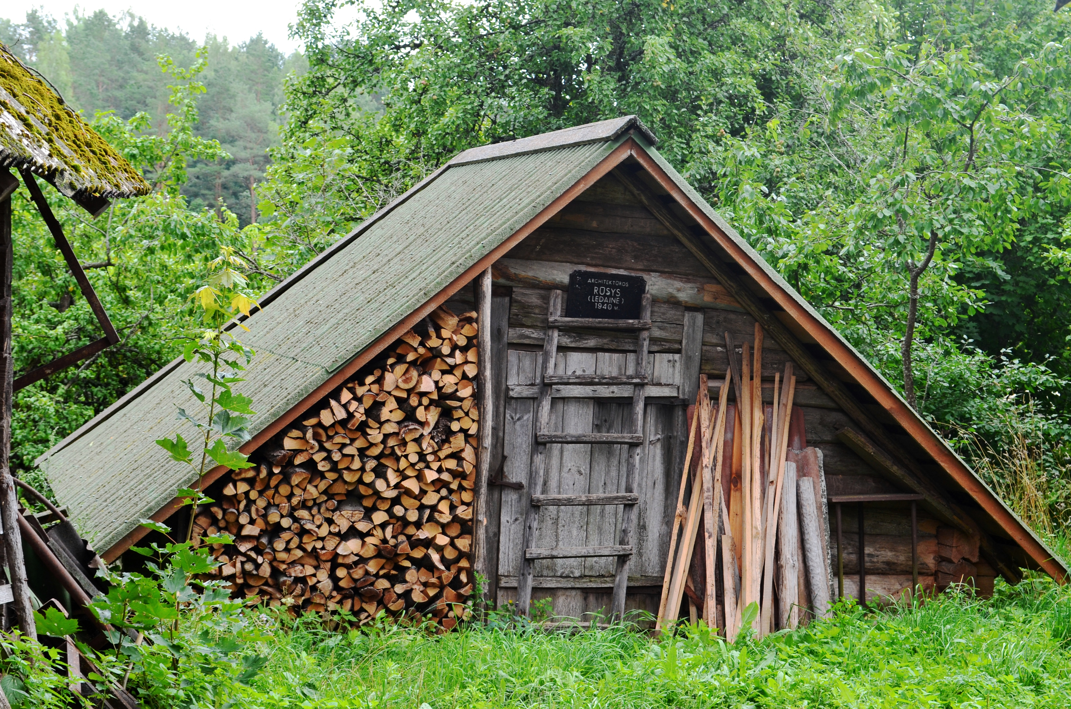 Ledainė, Salų (II) k., Ignalinos raj.